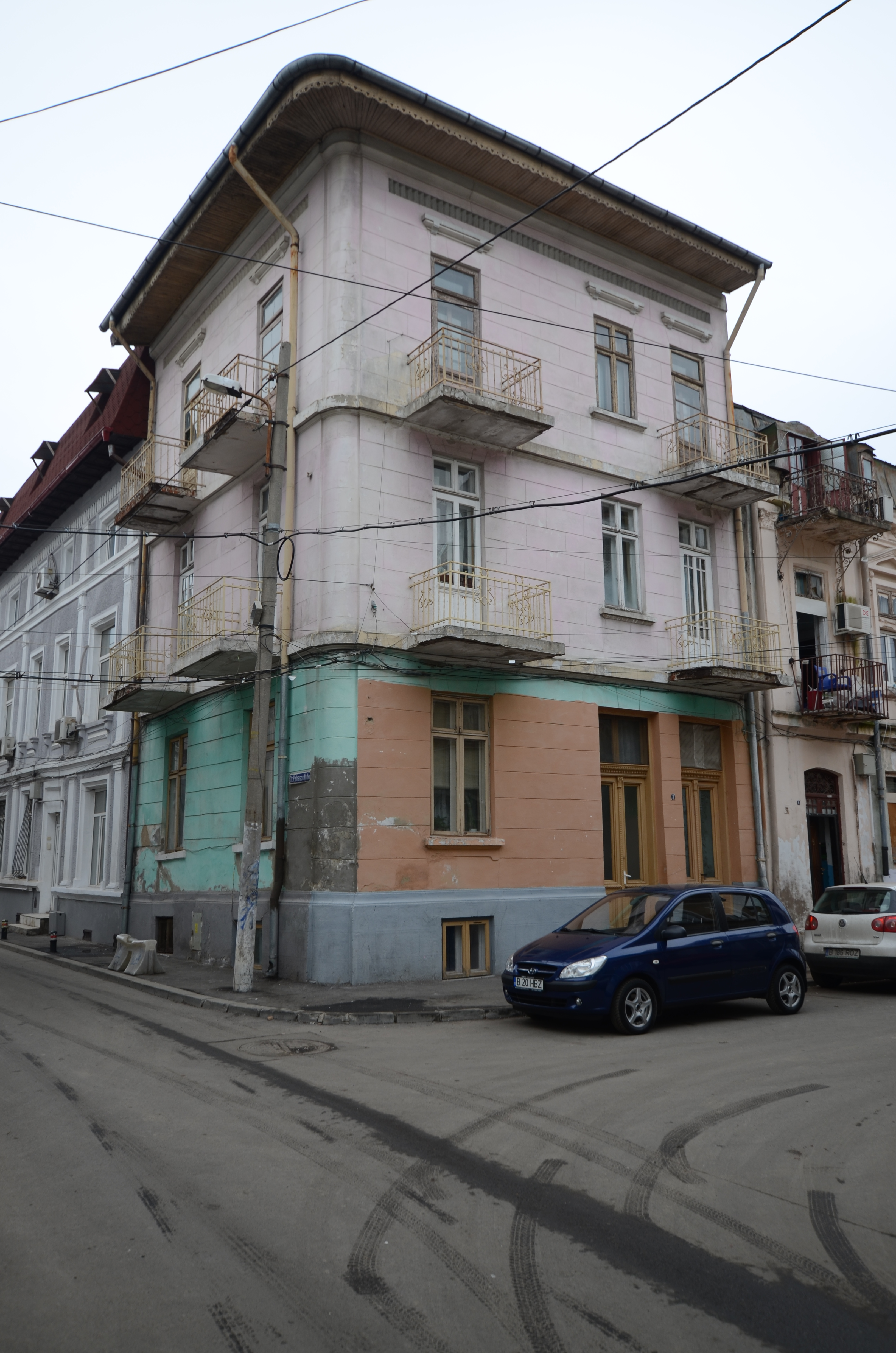 Casă, Str. Sarmizegetusa nr. 8, București